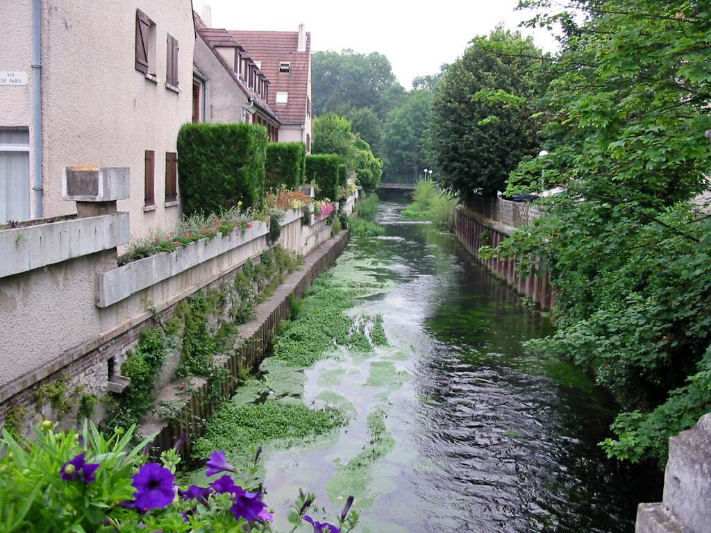 L'Epte à Gisors (27) Photo JH Mora, juin 2005